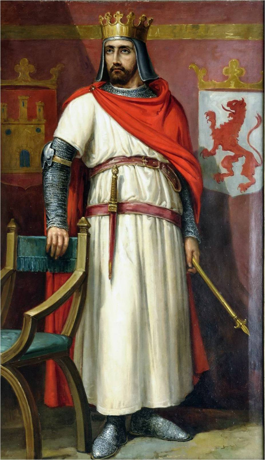 Retrato imaginario del rey Enrique II de Castilla (1334-1379). Fue hijo del rey Alfonso XI de Castilla y de Leonor de Guzmán. En 1369 asesinó a su hermanastro, Pedro I de Castilla, y ocupó el trono castellano en su lugar. Falleció en 1379 en Santo Domingo de la Calzada y fue sucedido en el trono por su hijo, Juan I de Castilla.